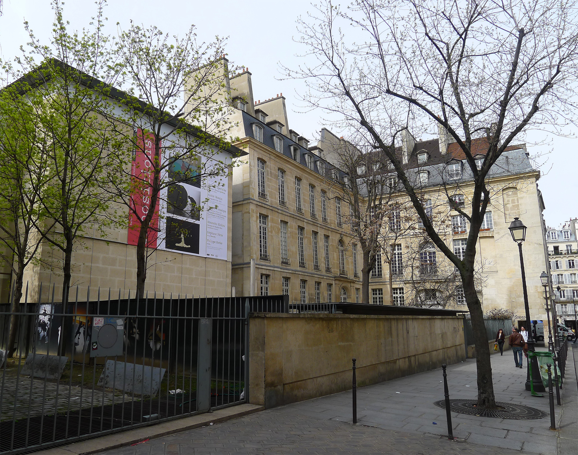 Rue de Fourcy (n° 5/7 : MEP, ancien hôtel Hainault de Cantobre) - Paris IV